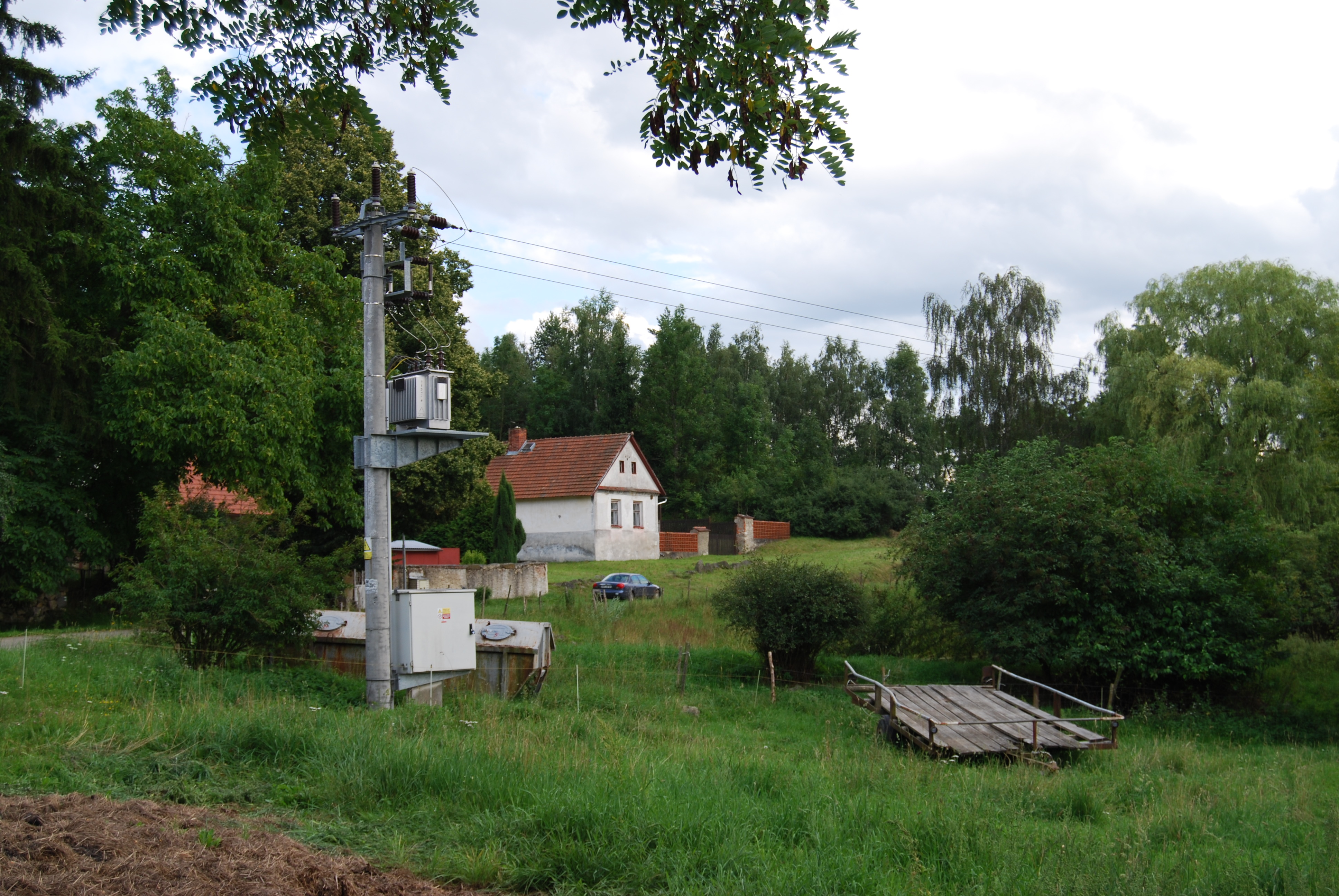 Pohled na část obce. Hodkov je malá část obce Jistebnice v okrese Tábor. Česká republika.